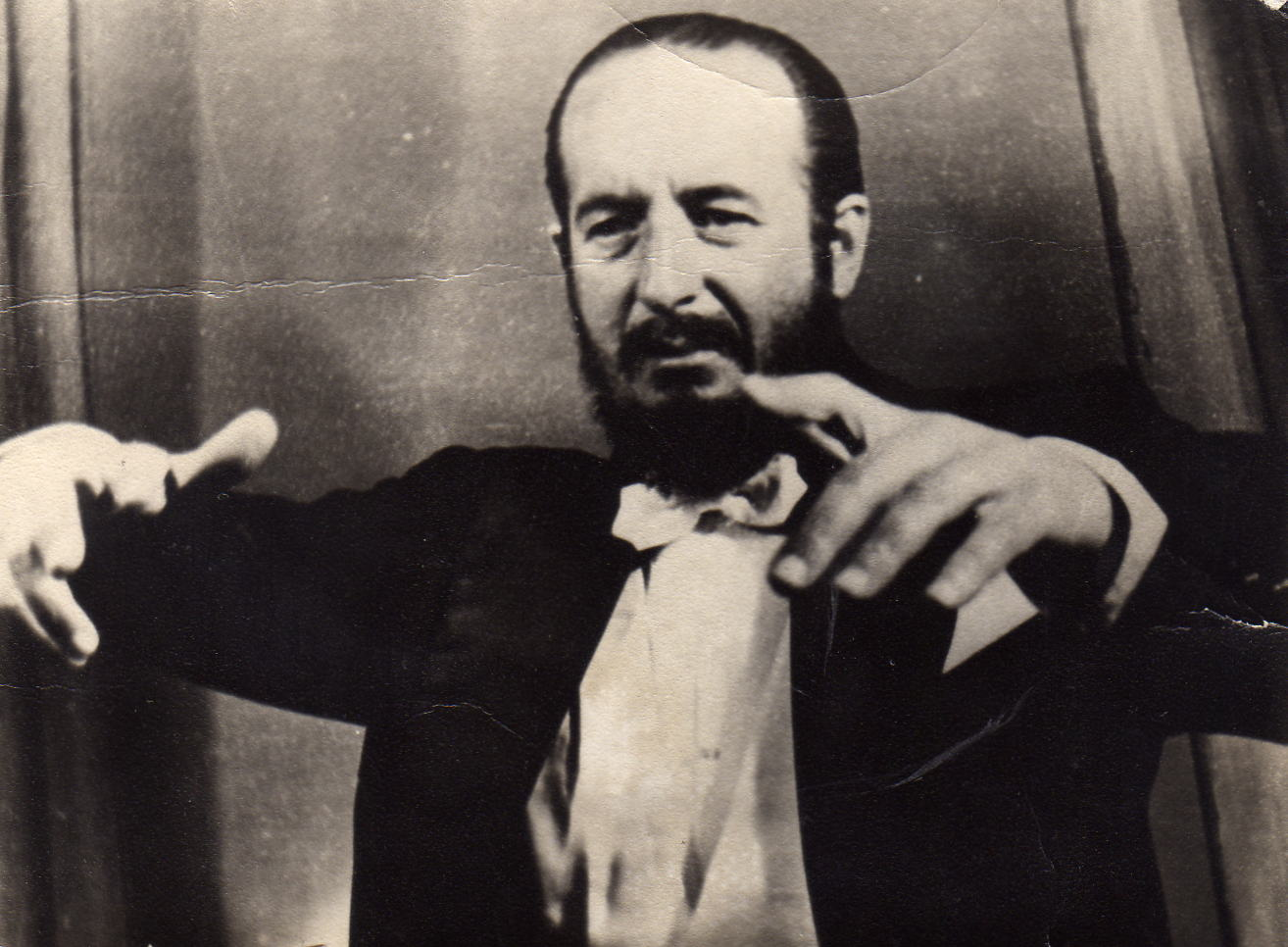 Jorge Peña Hen (La Serena, 16 de enero de 1928-16 de octubre de 1973) fue un músico y compositor chileno.